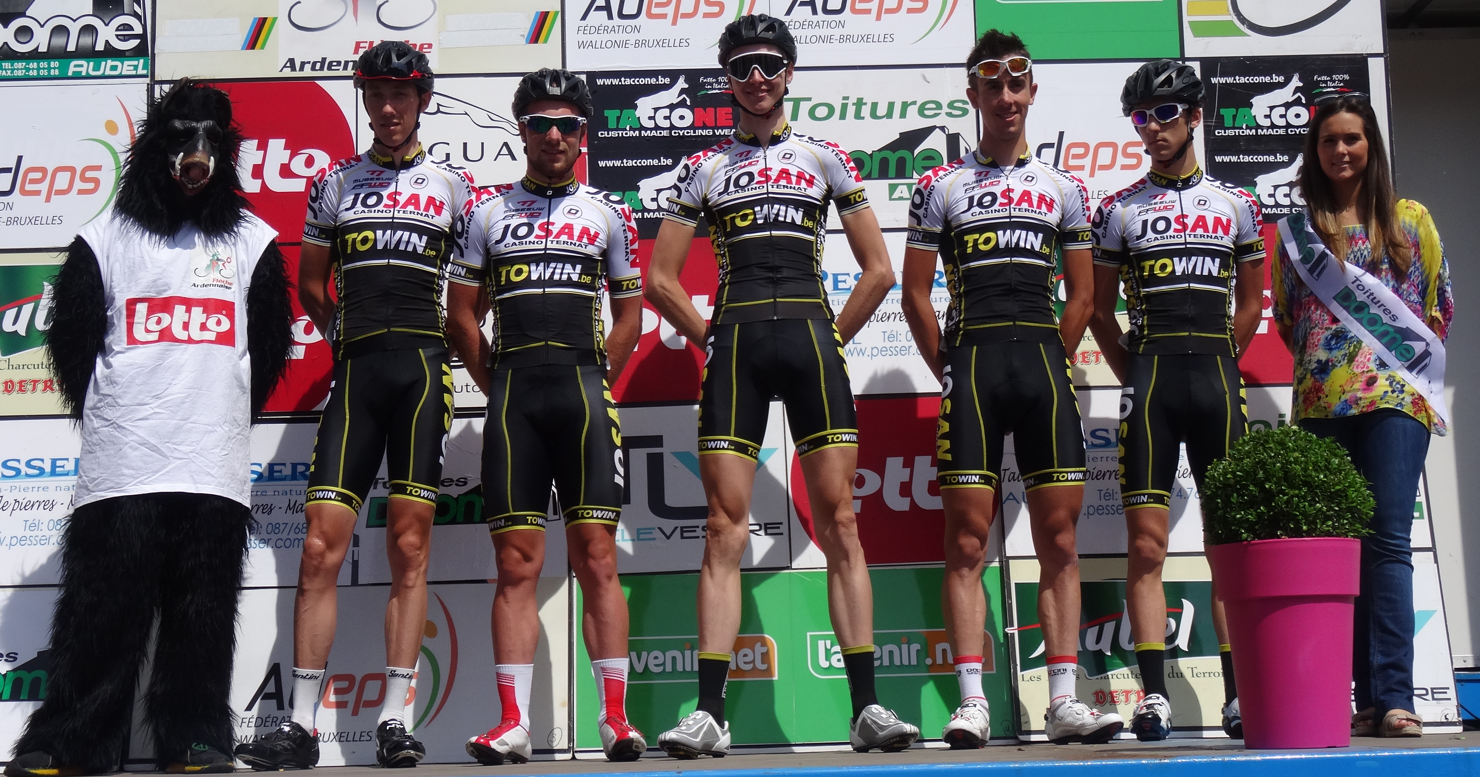 Reportage photographique réalisé le dimanche 22 juin à l'occasion du départ et de l'arrivée de la Flèche ardennaise 2014 à Herve, Belgique.